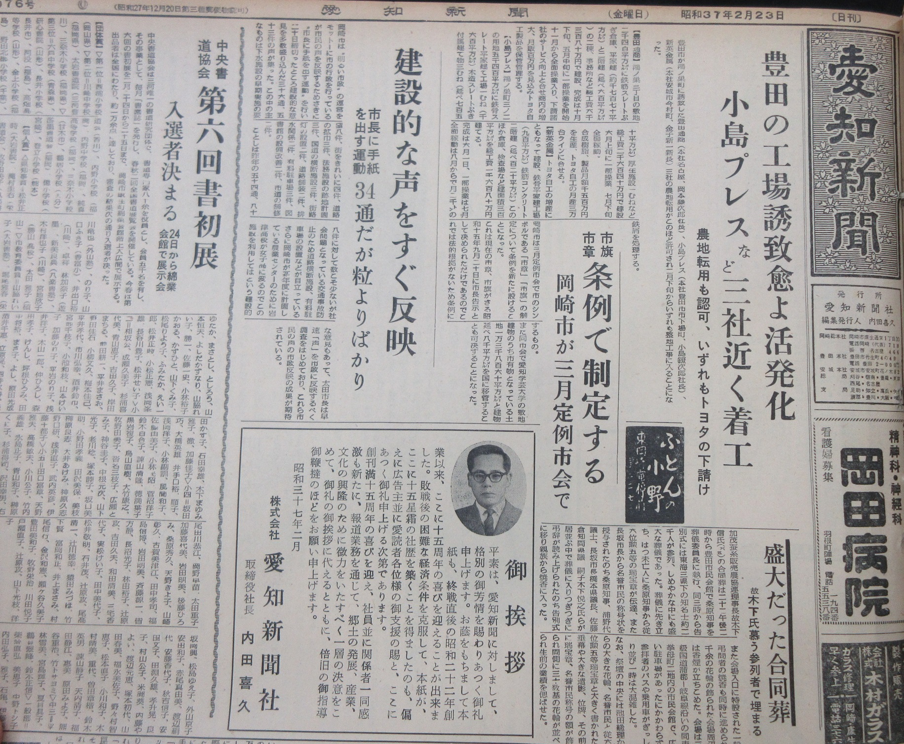 『愛知新聞』1962年2月23日。自紙の創刊15周年（三河タイムス時代から数えて）を報ずる記事。